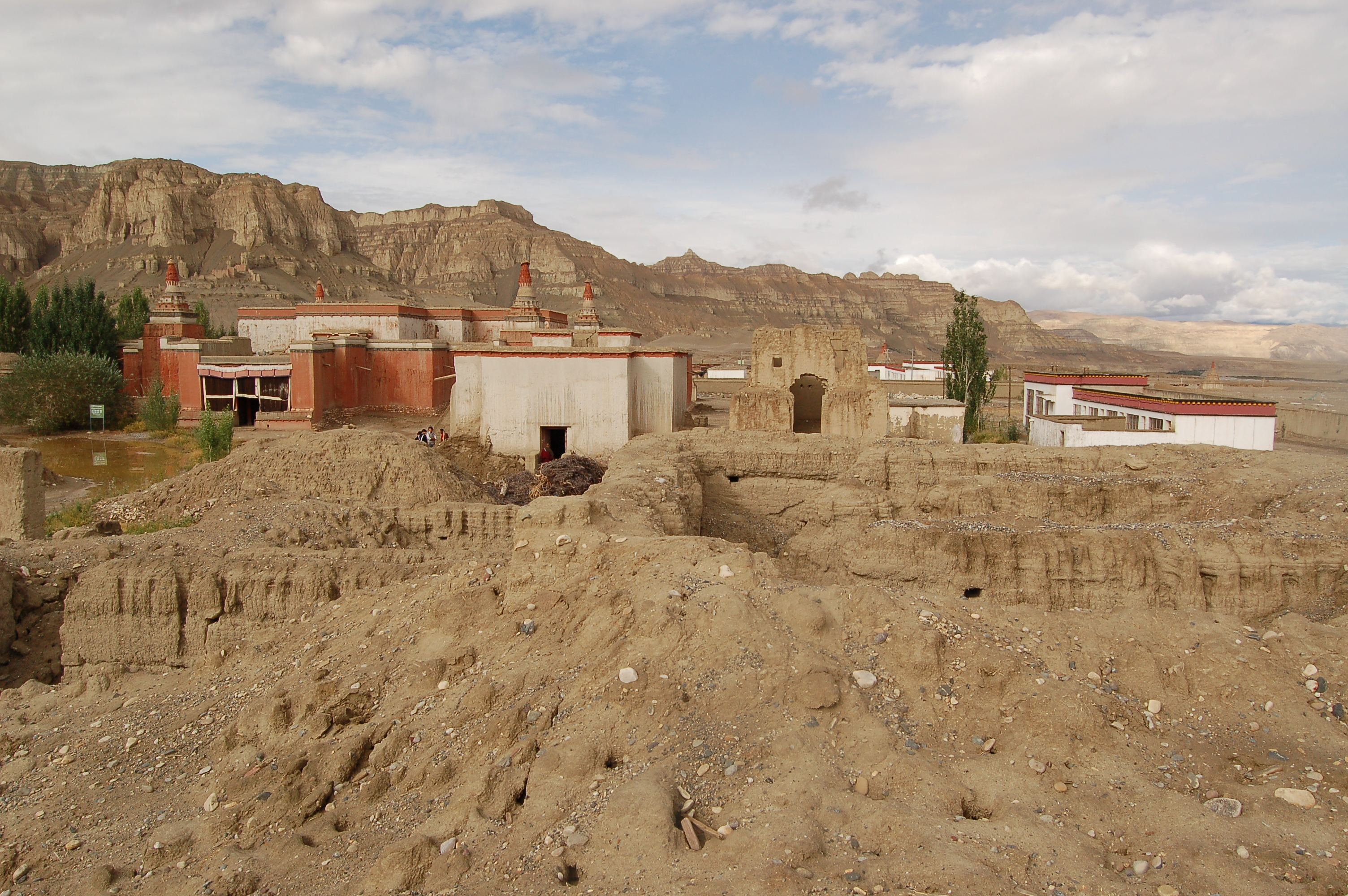 Ruinen zerstörter Klostergebäude um den 986 errichteten Roten Tempel von Tholing (Tibet)